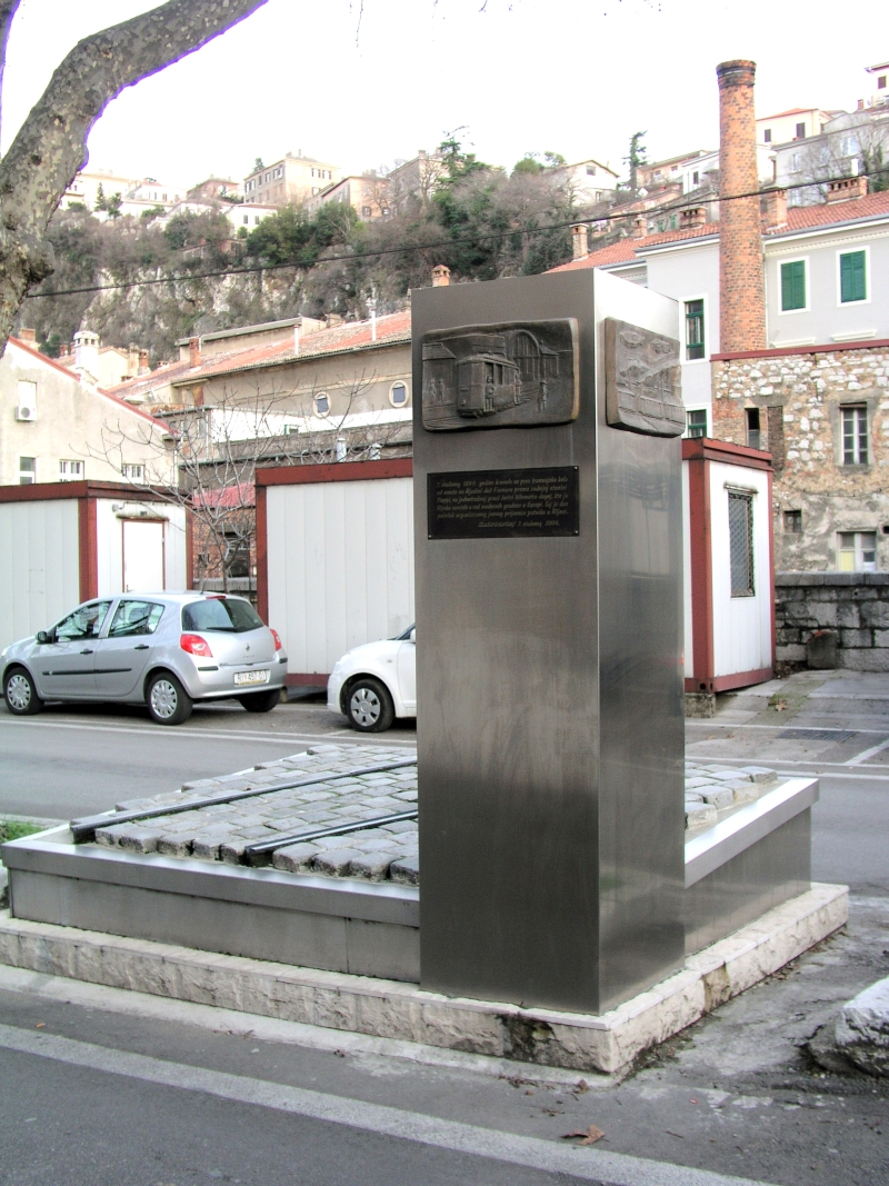 spomenik početku organiziranog javnog prijevoza putnika u Rijeci